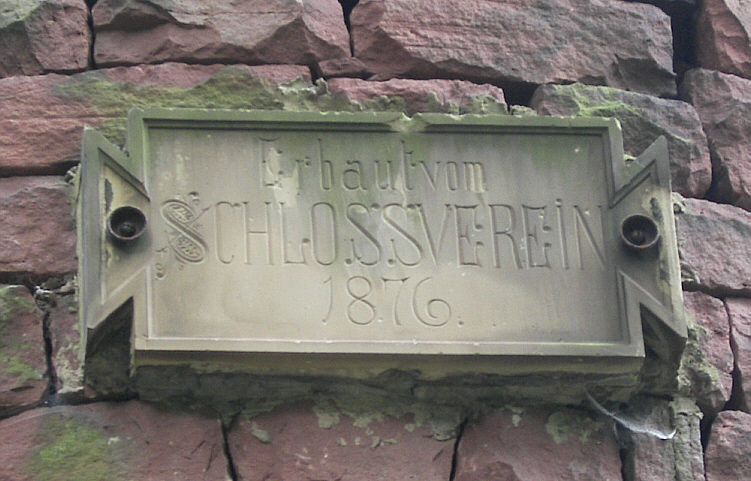 Inschrift am Gaisbergturm